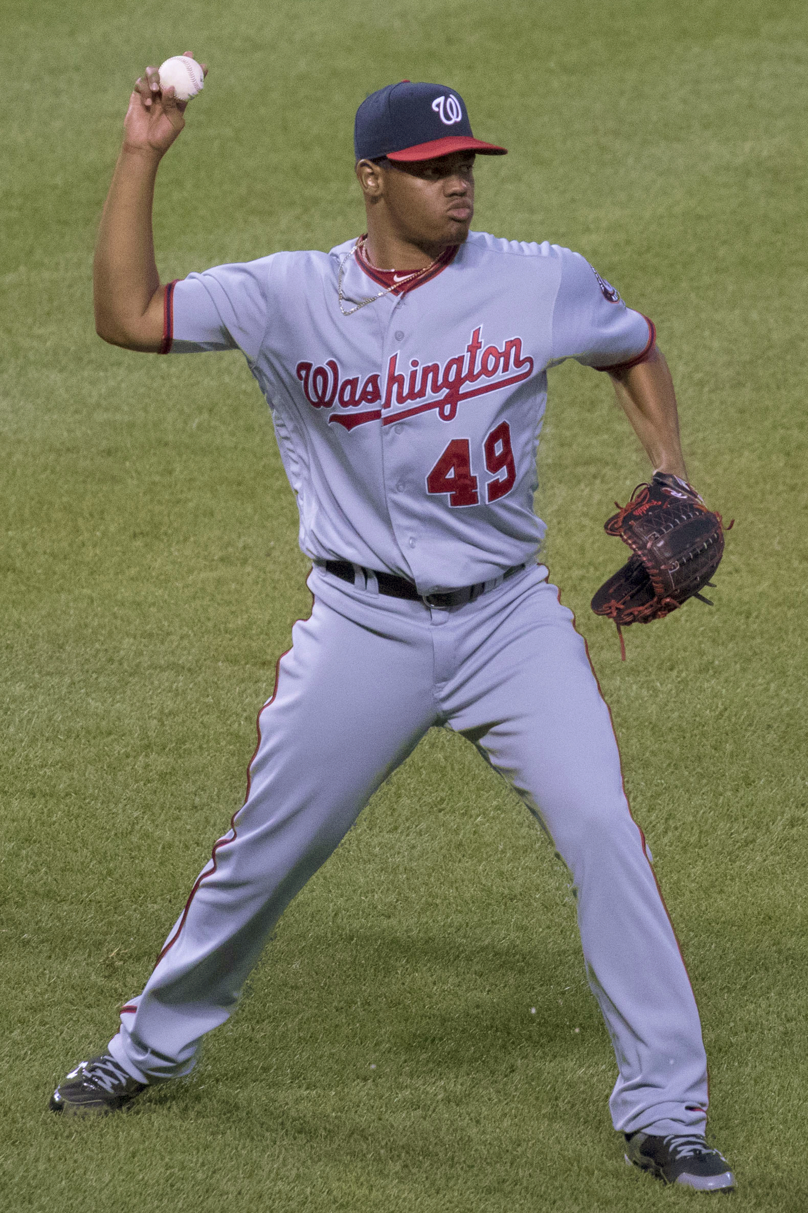 Reynaldo López